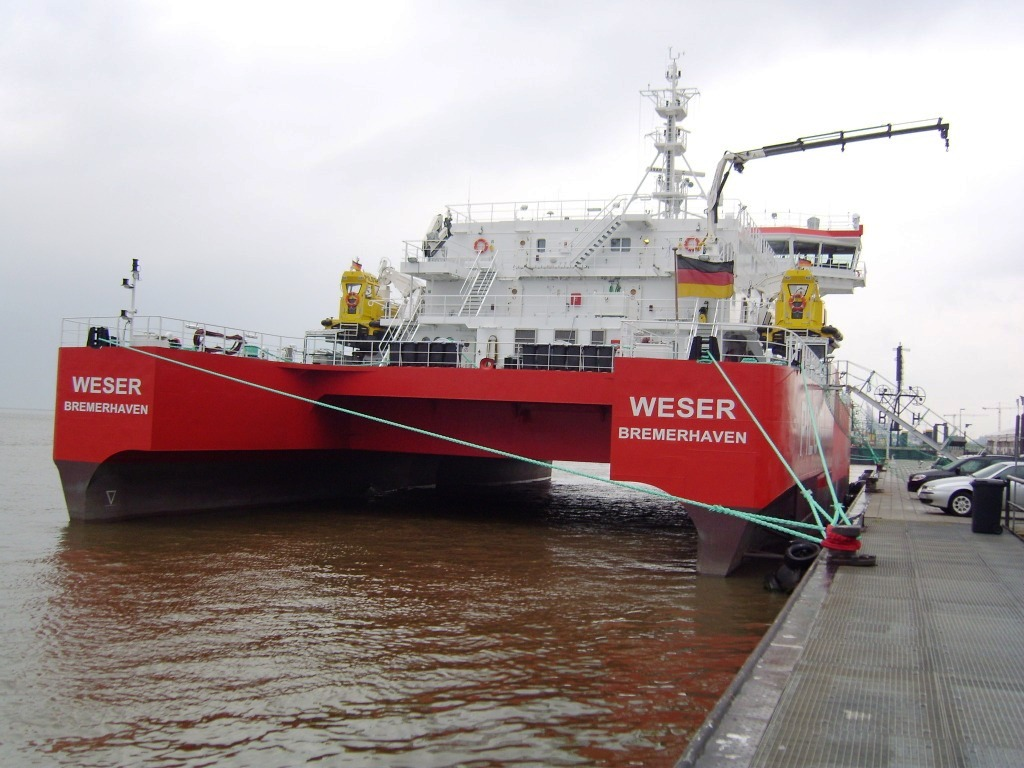 Lotsenstationsschiffe Weser in Swath-Bauart, von A&R in Bremerhaven auf dem Geländer der ehemaligen Siegholt-Werft erbaut